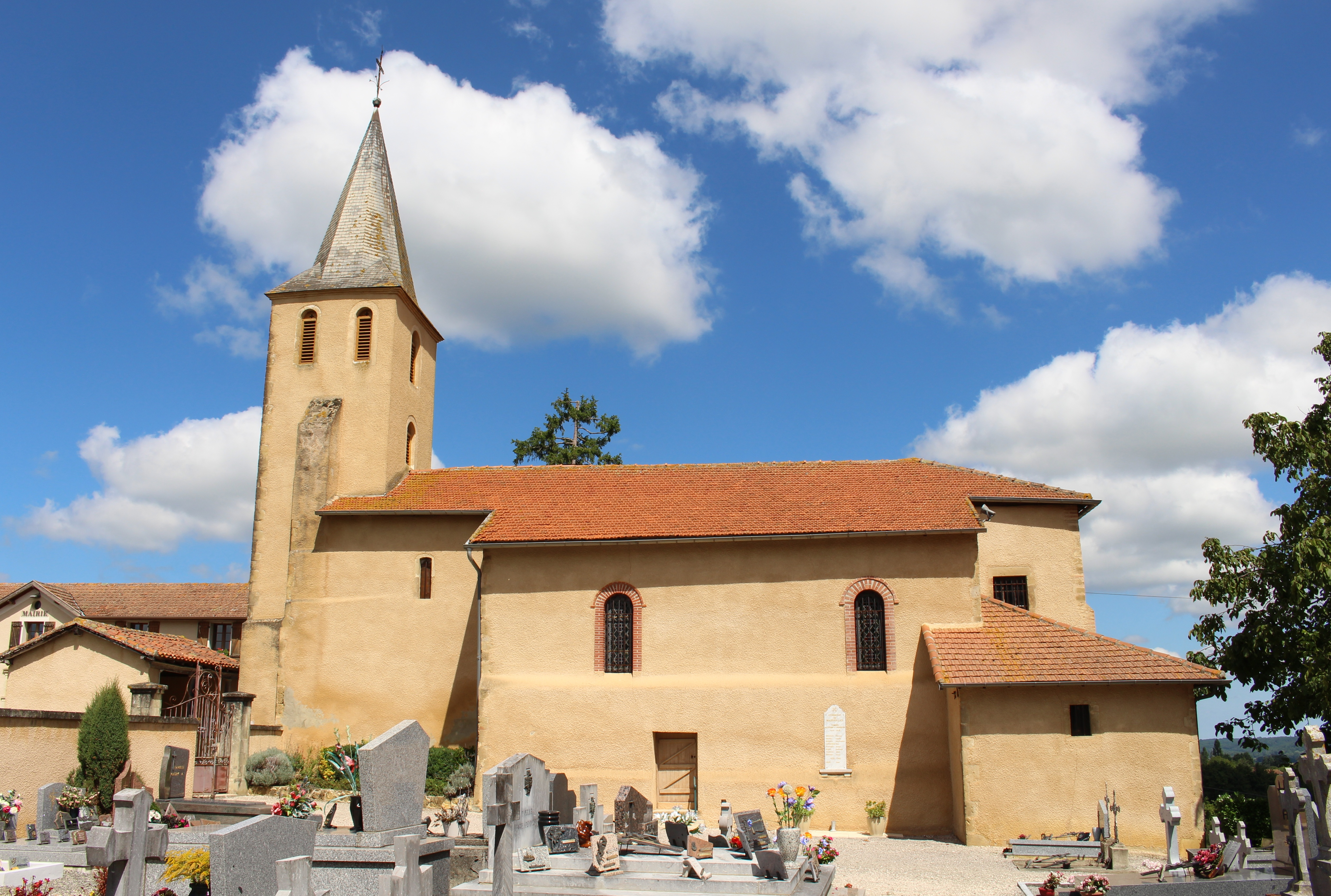 Église de l'Assomption de Mazerolles (Hautes-Pyrénées)